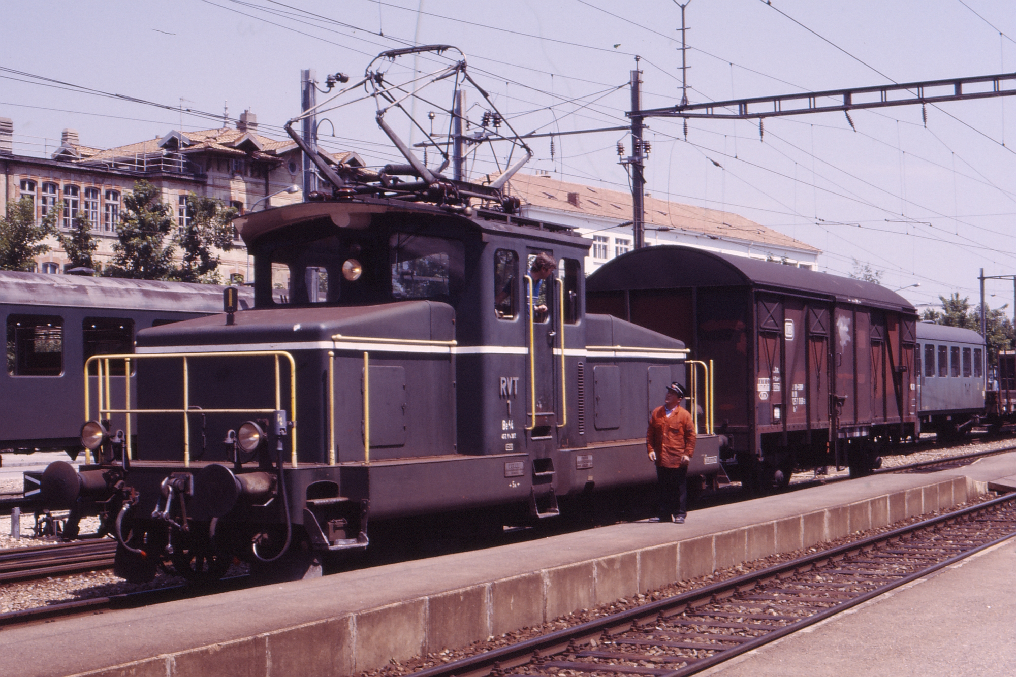 RVT Switzerland OLD Be 4/4 Lok 1